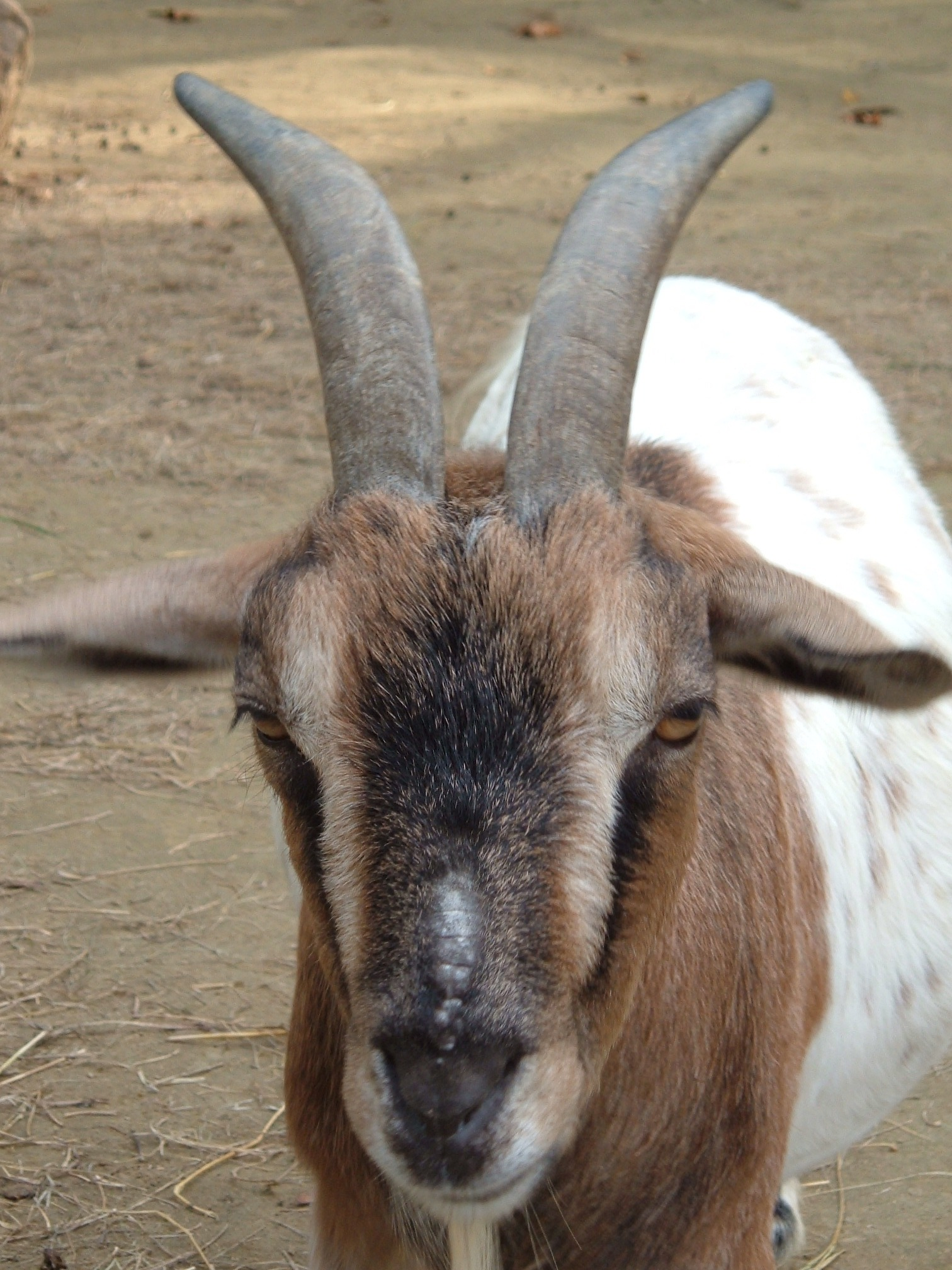 Egy házikecske portréja a Jászberényi Állatkertben.